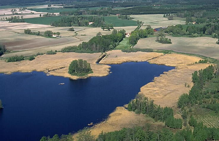 Motiv: Boskulla Nyckelord: Flygbilder, Riksintressen Kategori: Miljöer, OdlingslandskapBoskulla